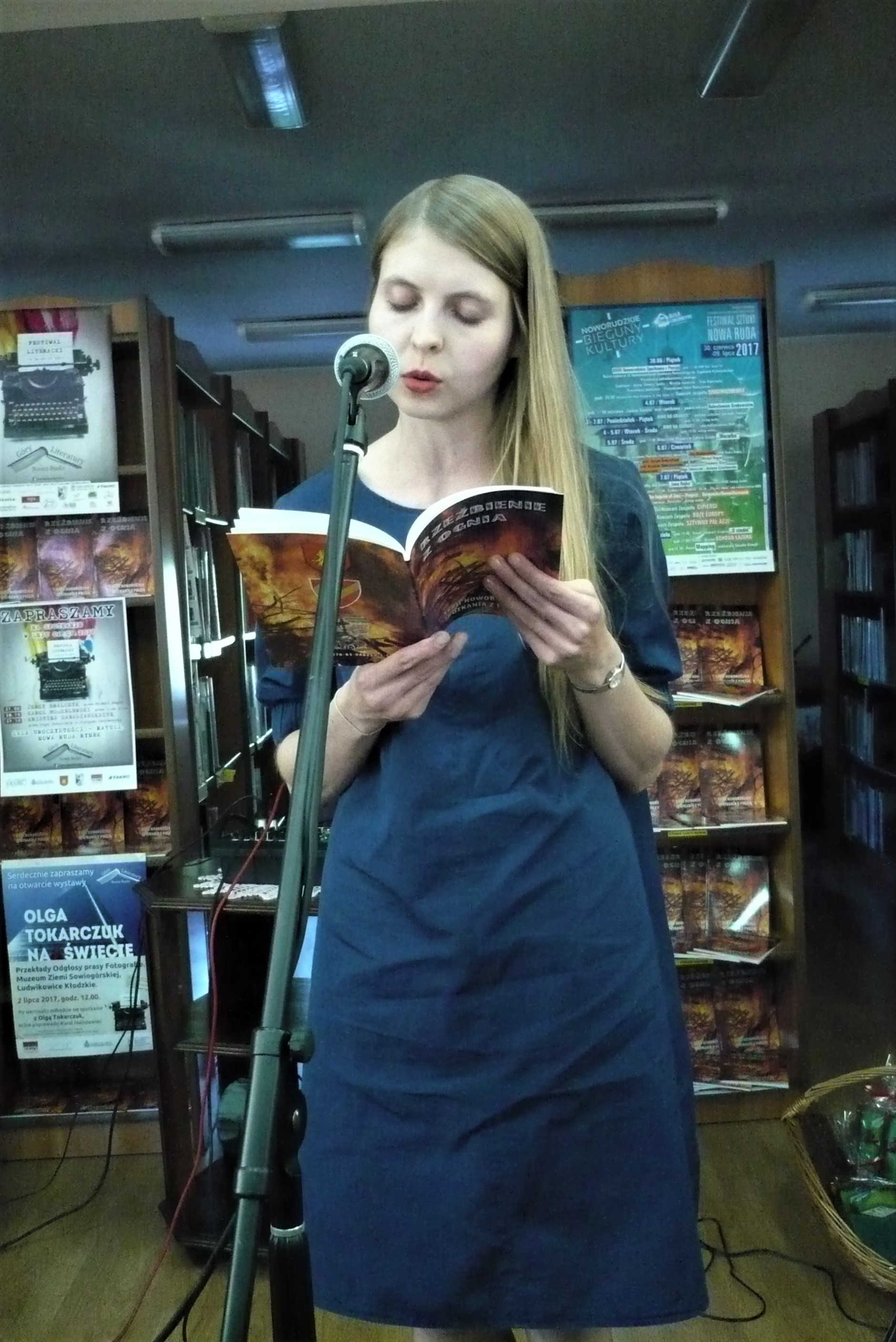 Paulina Pidzik